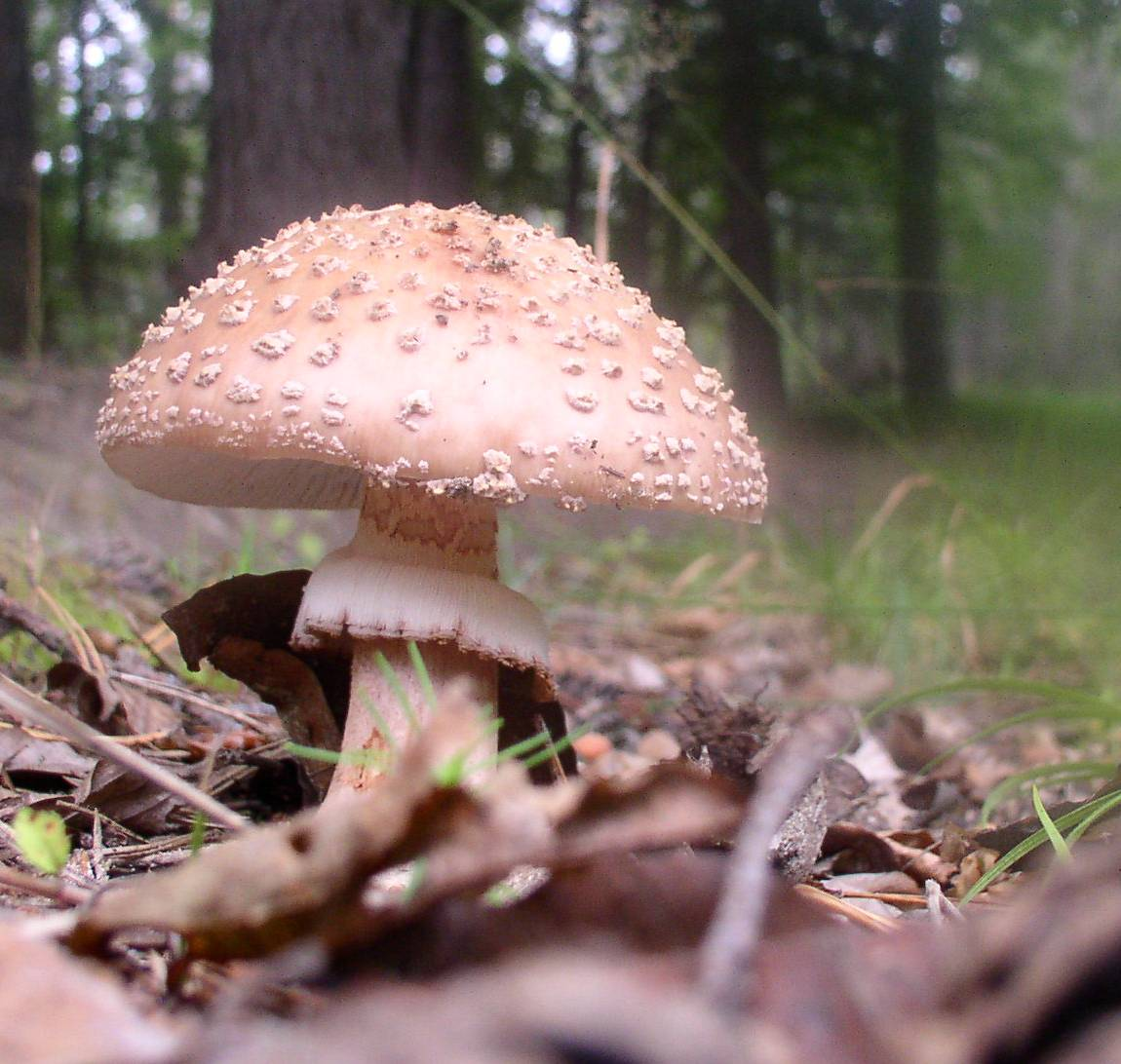 Muchomor czerwieniejący